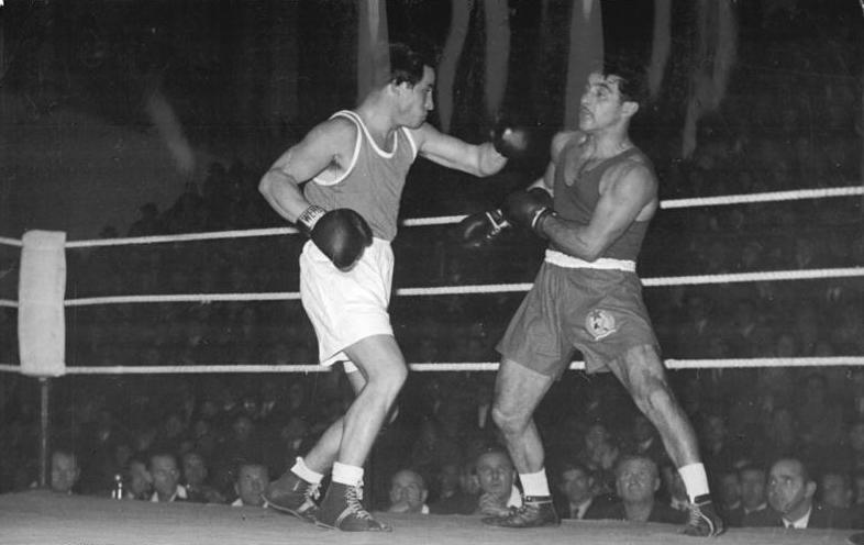 Papp, Schultze Illus I. 26.11.51 Deutsche Box-Sportler in Budapest. Am 18. November 1951 wurden in der Budapester Sporthalle die Boxmeisterschaften zwischen einer Auswahlmannschaft der Deutschen Demokratischen Republik und der Ungarischen Volksrepublik ausgetragen.Die Boxkämpfe endeten mit einem Sieg der ungarischen Sportler. UBz: Der Olympiasieger Papp (Ungarn) boxt gegen Schultze (DDR).